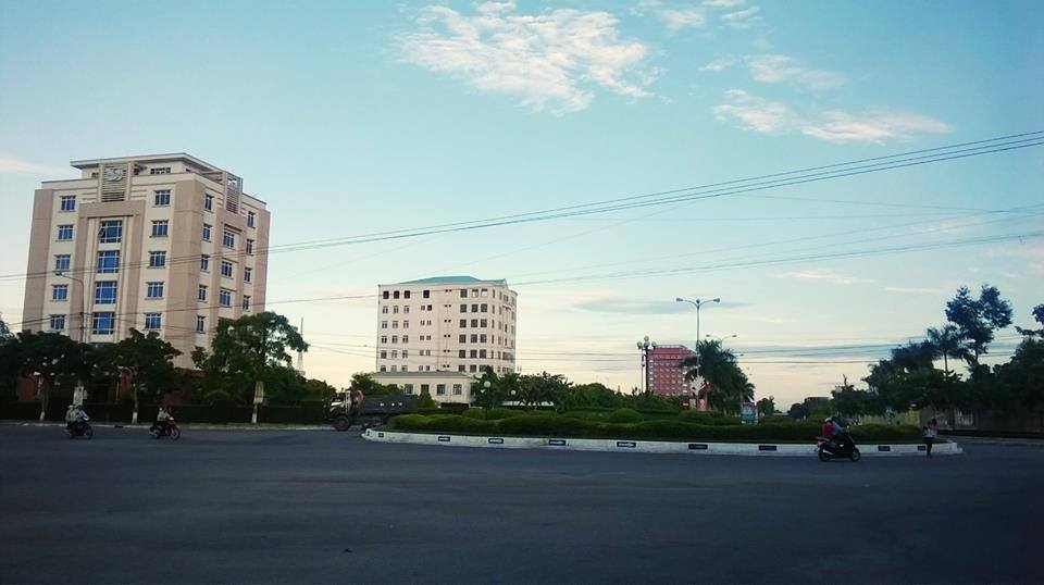 Tam Ky